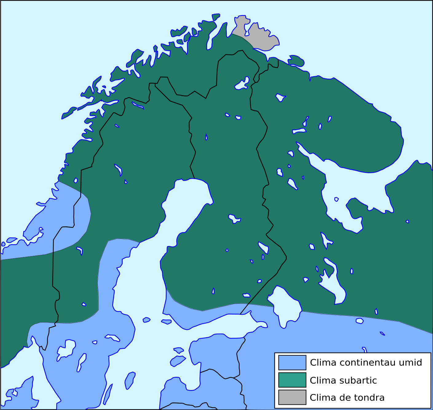 Clima de Finlàndia.